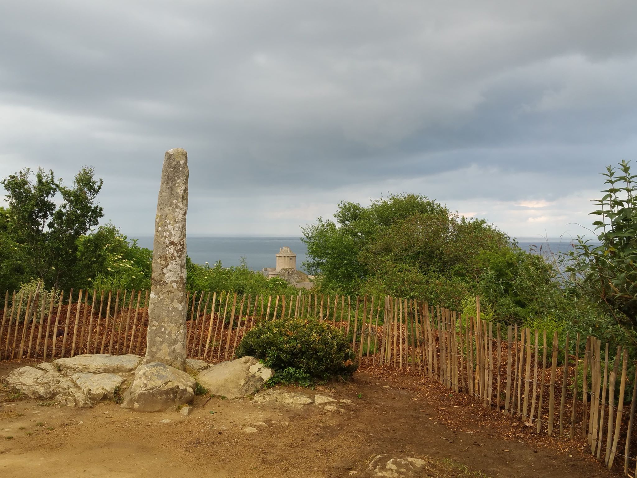 Le menhir de La Latte, (dent de Gargantua) situé dans le chemin privé du parc du château de la Roche Goyon sur le village de Plévenon (Côtes d'Armor)